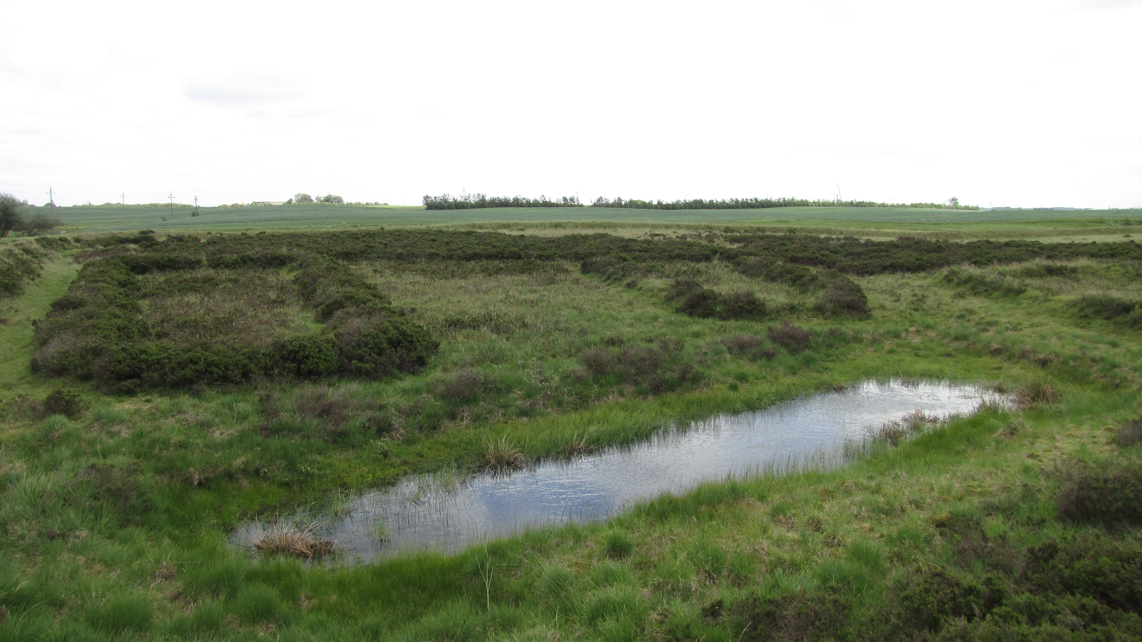 Borremosefæstningen